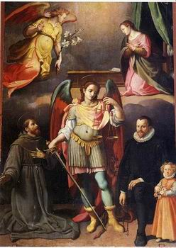 L'Annunciazione, san Michele, san Francesco e il conte Bardi con la figlioletta, l'empoli, chiesa di san mcihele a Sasseta